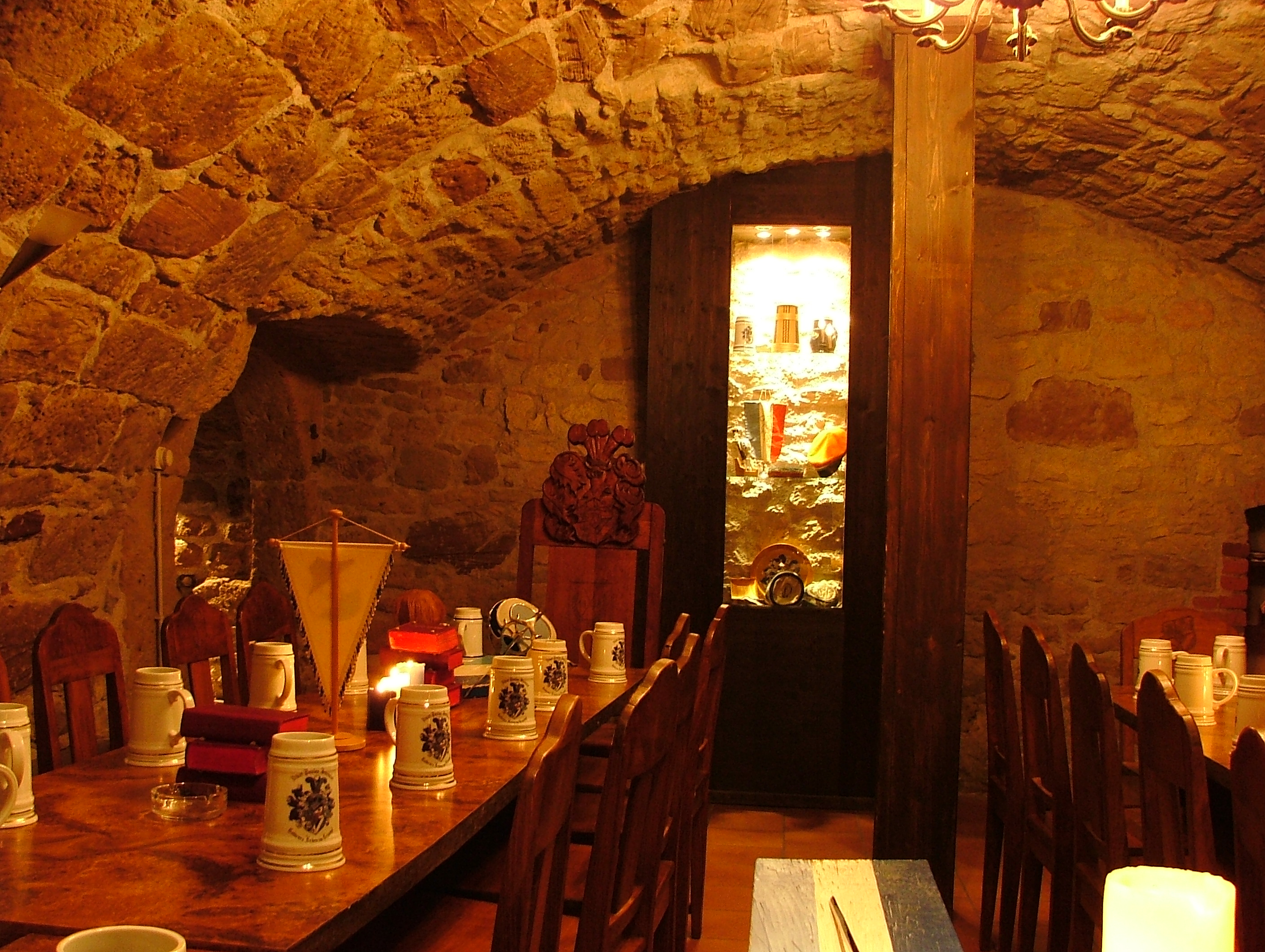 Gewoelbekeller des Paulinerheims Jena, Teil der Jenaer Stadtbefestigung